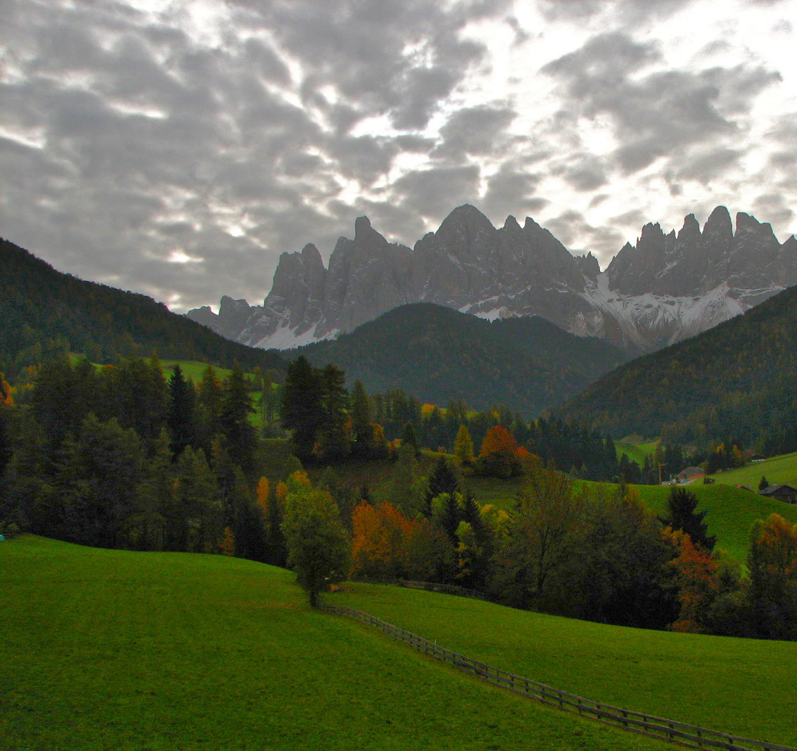 Villnöß Villnößtal Geislergruppe